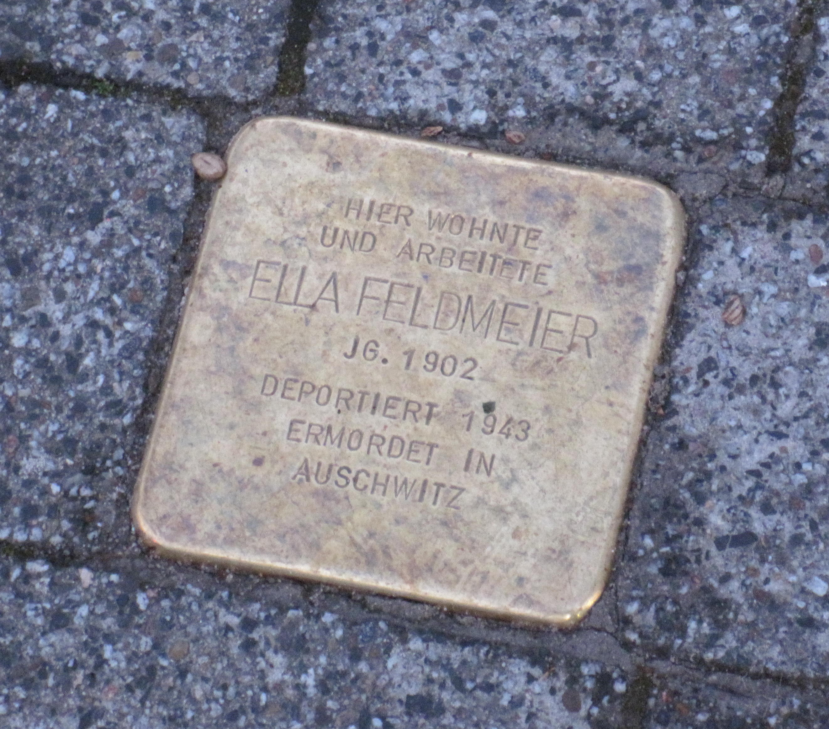 Stolperstein für Ella Feldmeier in Paderborn